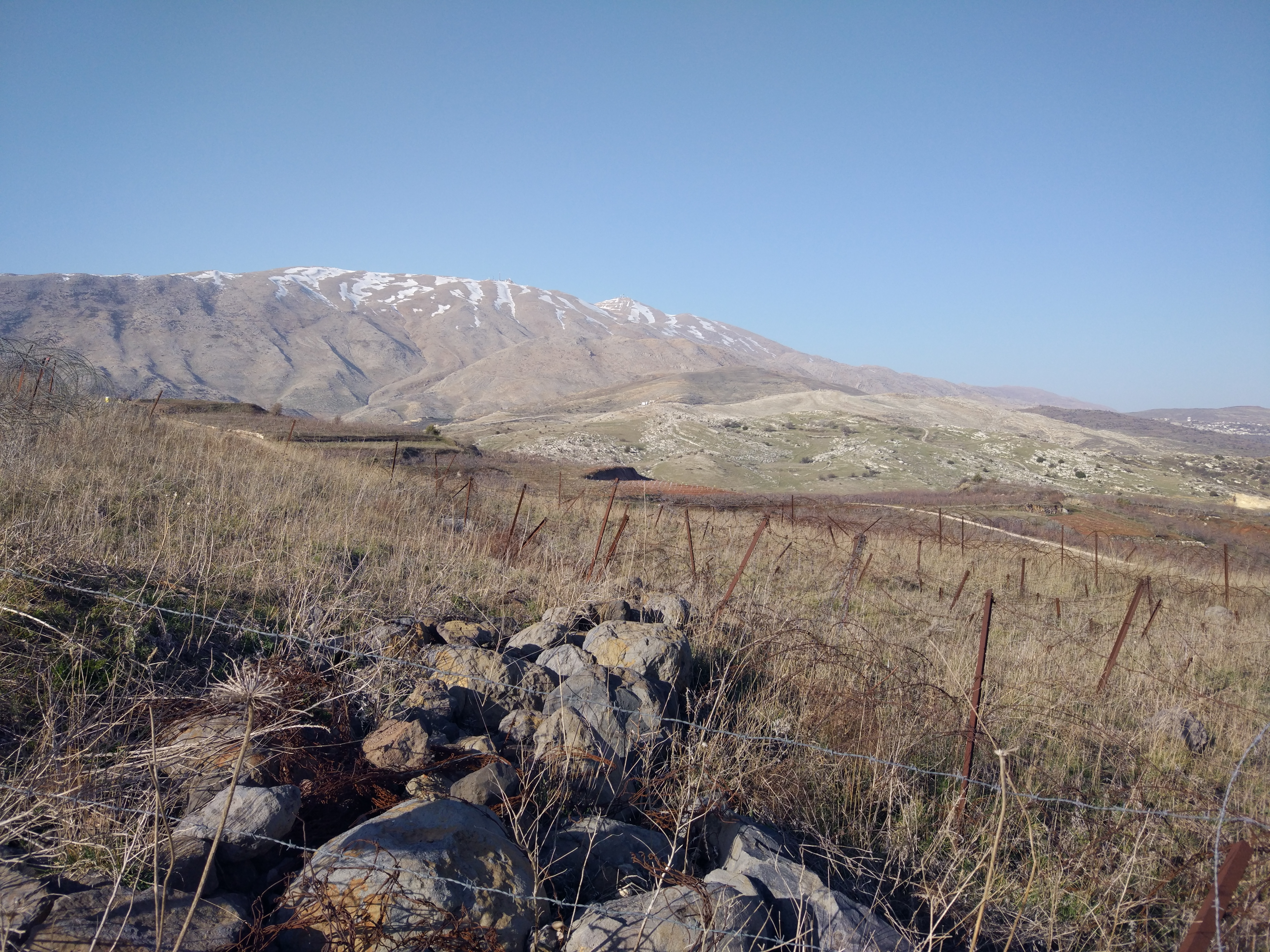 החרמון במבט מהר רם